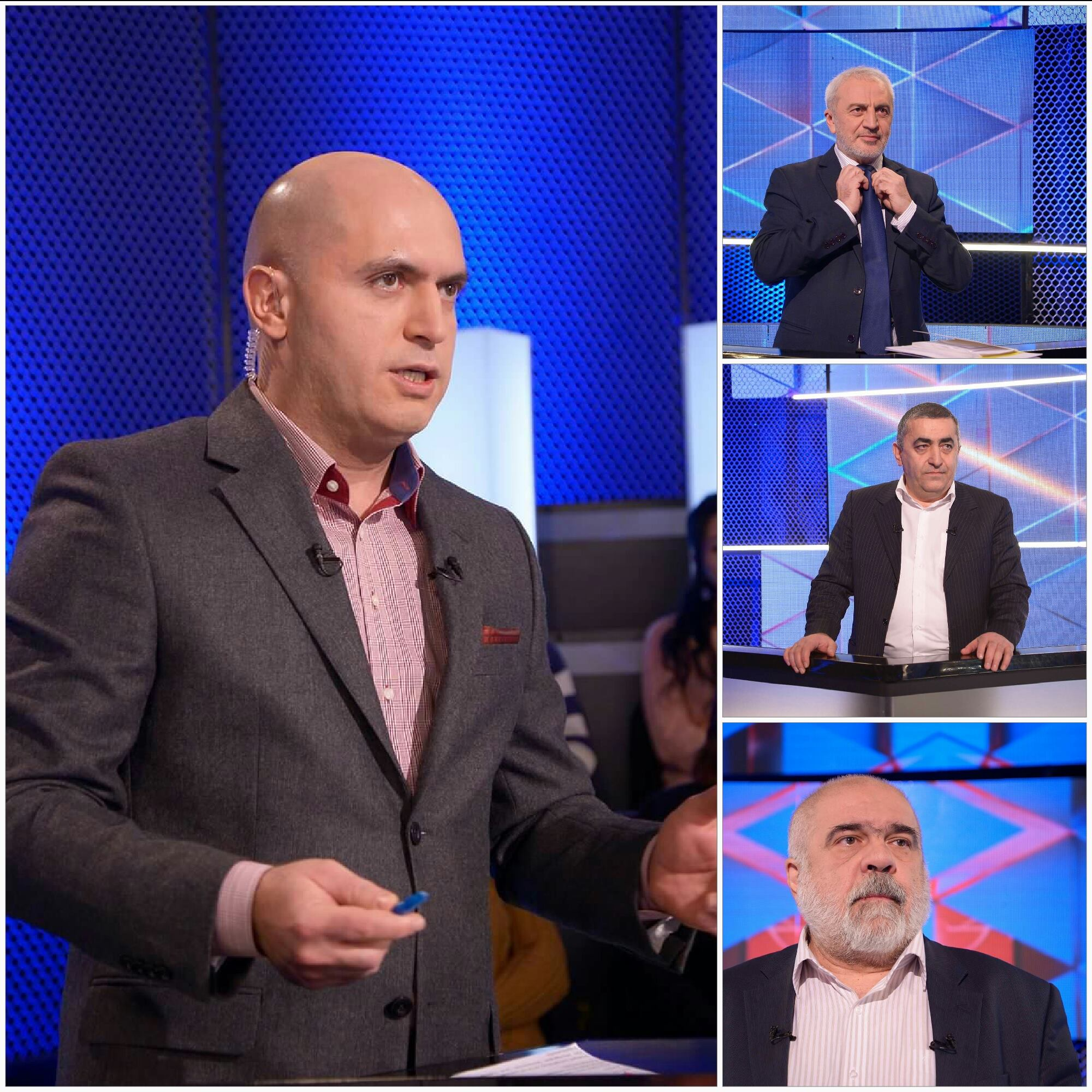 Ղարաբաղյան հակամարտության կարգավորում։ ԵՌԱՆԿՅՈՒՆԻ